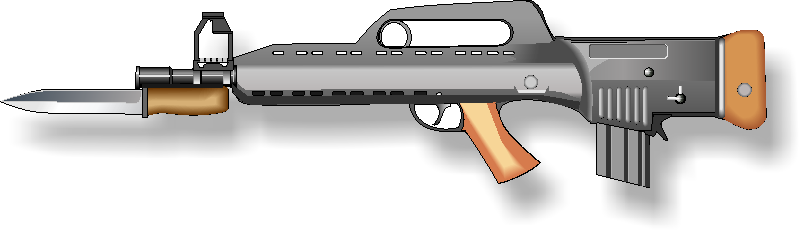 LAPA FA Model 3